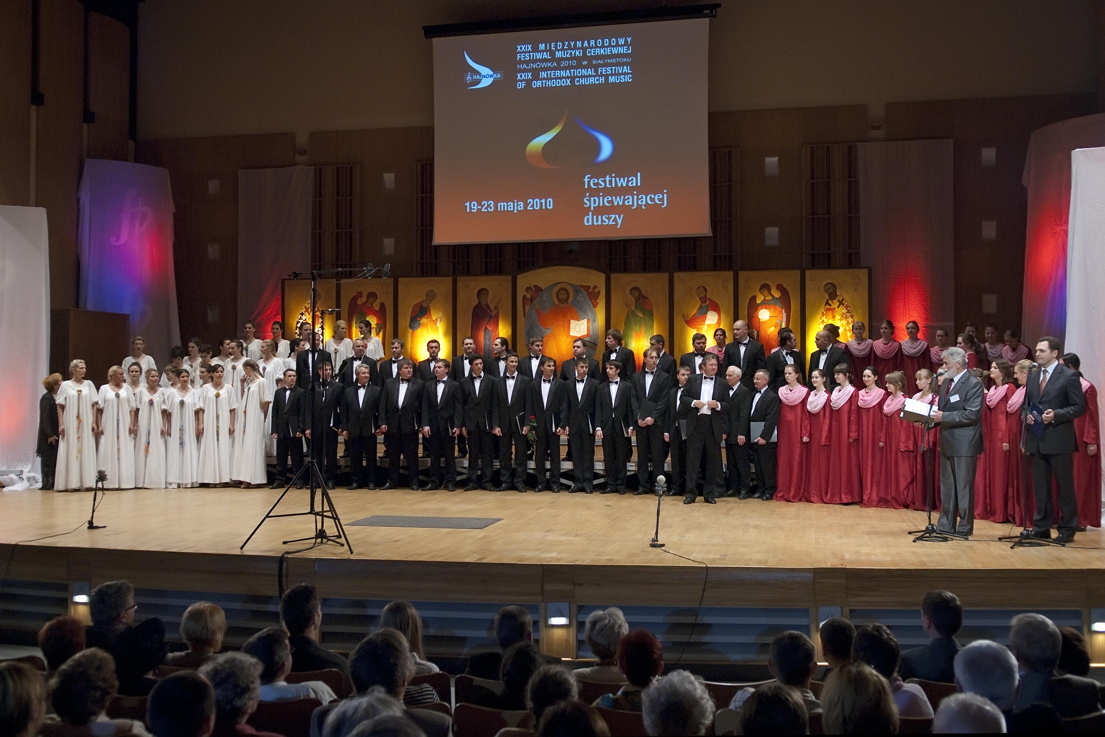 Koncert Galowy XXIX Międzynarodowego Festiwalu Muzyki Cerkiewnej - "Hajnówka 2010" , który odbył się w Operze i Filharmonii Podlaskiej w Białymstoku.